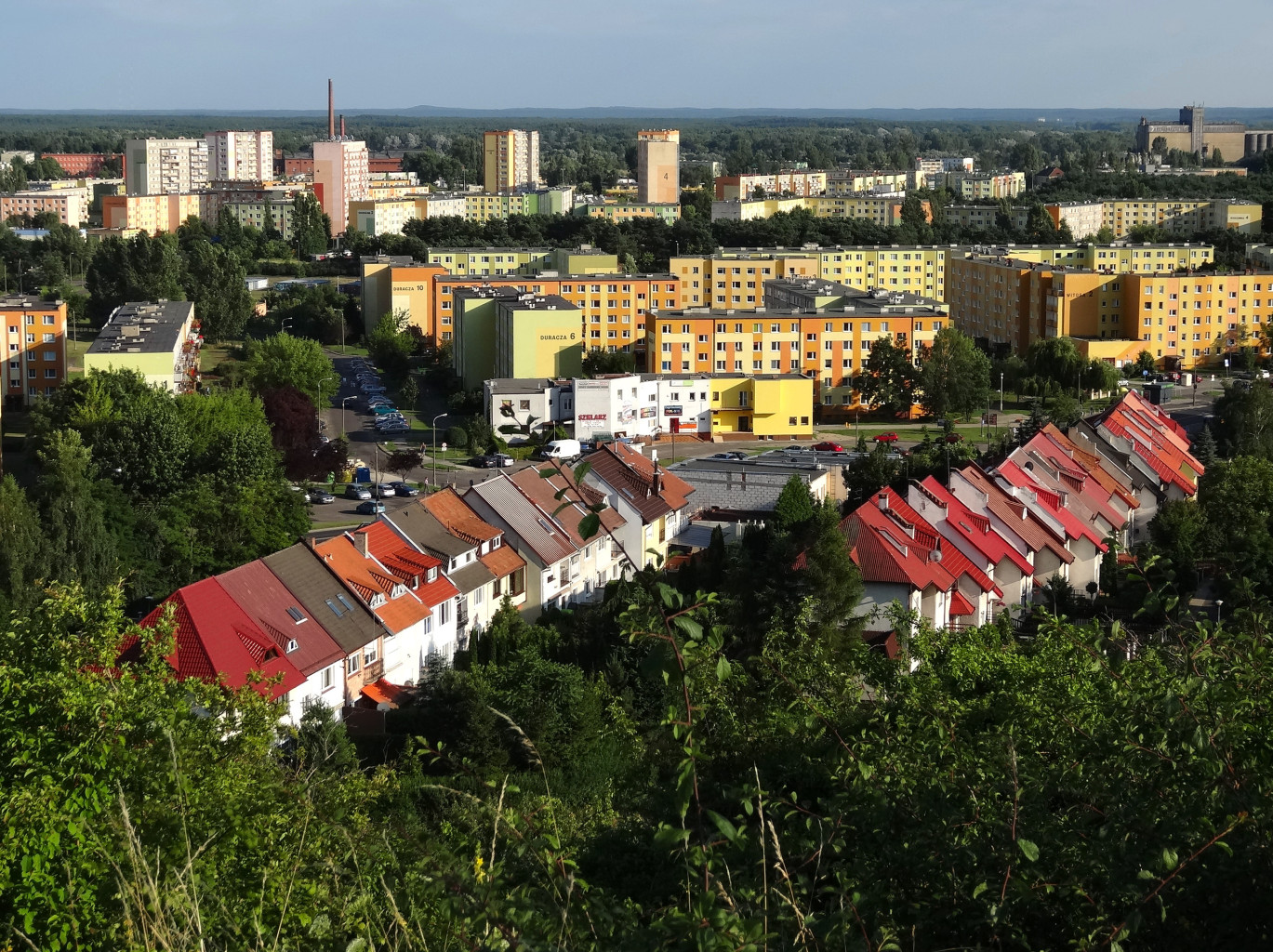 Widok z Góry Szybowników w kierunku południowym na osiedla Szybowników, Bohaterów i Bajka w dzielnicy Fordon w Bydgoszczy